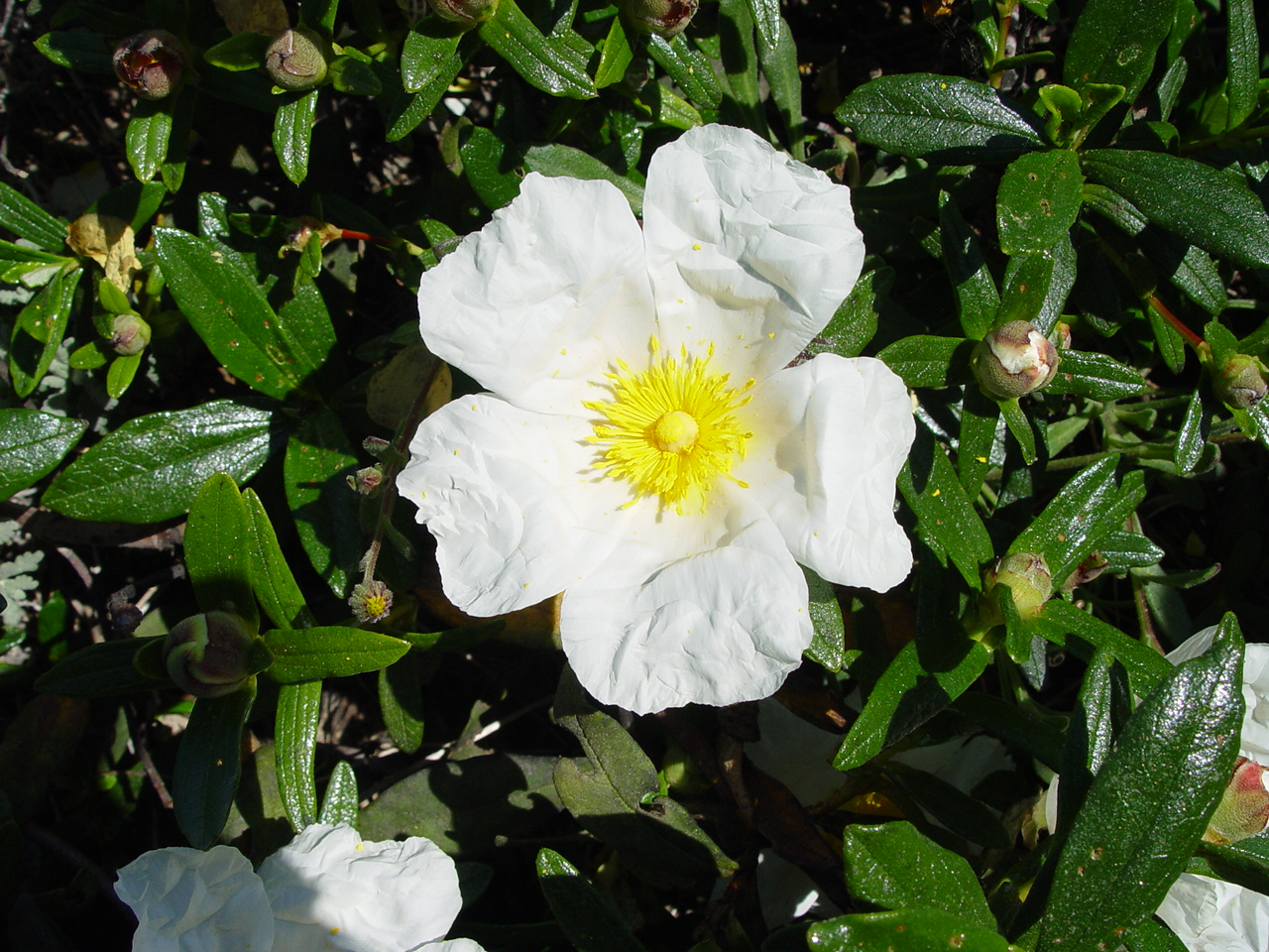 Name Cistus ladanifer subsp. sulcatus (syn. Cistus palhinhae) Familiy Cistaceae